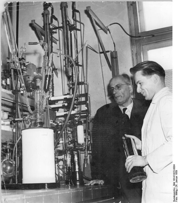 Zentralbild-Wittig Qua-Qu 26.1.1959 Quaschinsky Zum Chemieprogramm der DDR: Aus der Arbeit der Forschungsstelle für Komplexchemie der Deutschen Akademie der Wissenschaften zu Berlin. In den Räumen des "Döbereiner-Instituts" für anorganische Chemie der Friedrich-Schiller-Universität in Jena befindet sich die Forschungsstelle für Komplexchemie der Deutschen Akademie der Wissenschaften zu Berlin. Der Leiter ist Nationalpreisträger Dr.Dr.h.c. Fr. Hein, Hervorragender Wissenschaftler des Volkes. Die Forschungsstelle beschäftigt sich mit Grundlagenforschung, insbesondere mit chromorganischen Arbeiten unter anaeroben Bedingungen, d.h. unter Ausschluß von Luft und Feuchtigkeit. UBz. Der Leiter der Forschungsstelle Prof.Dr.Dr. h.c. Hein im Gespräch mit dem Diplom-Chemiker Erhard Kurras (rechts).